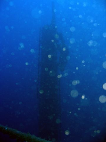 Amoco Milford Haven